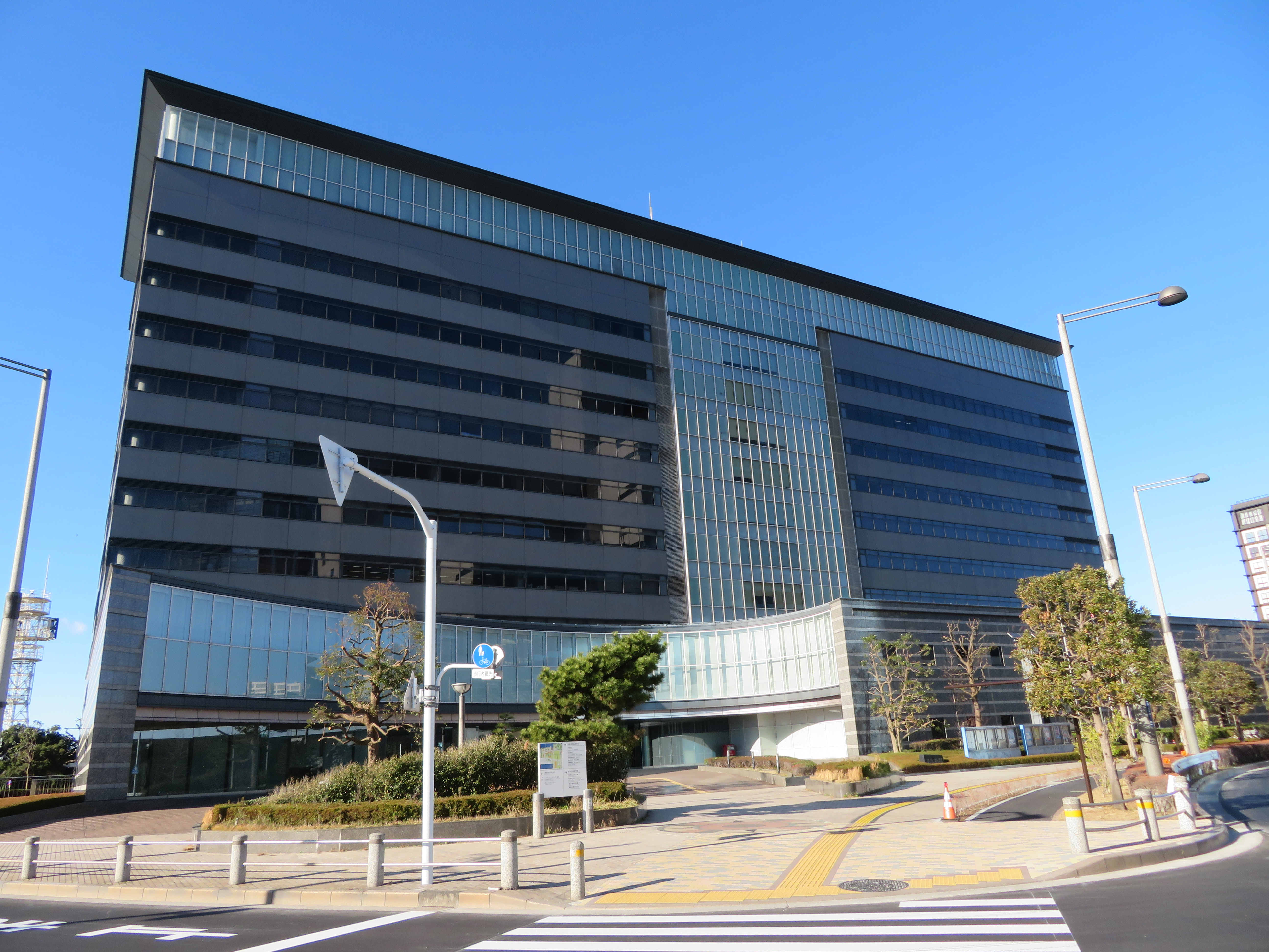 東京都江東区に所在する東京港湾合同庁舎。以下の官署が入居する。 東京税関、税関研修所東京支所、東京検疫所、横浜植物防疫所東京支所、動物検疫所羽田空港支所東京出張所、東京出入国在留管理局おだいば分室、関東運輸局東京運輸支局、第三管区海上保安本部東京海上保安部 Canon PowerShot SX720 HS